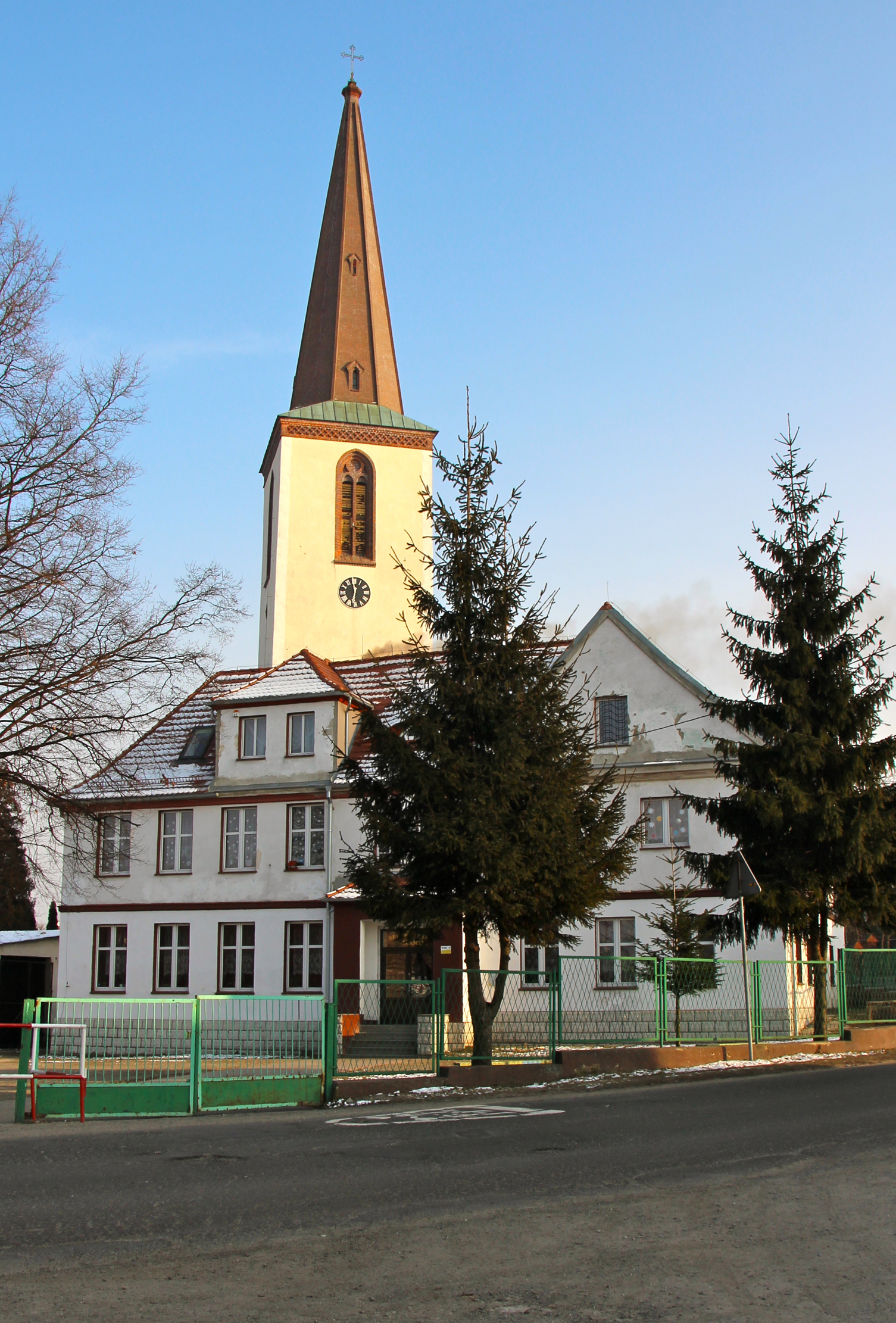 Jaźwina – wieś w Polsce w województwie dolnośląskim, w powiecie dzierżoniowskim, w gminie Łagiewniki.